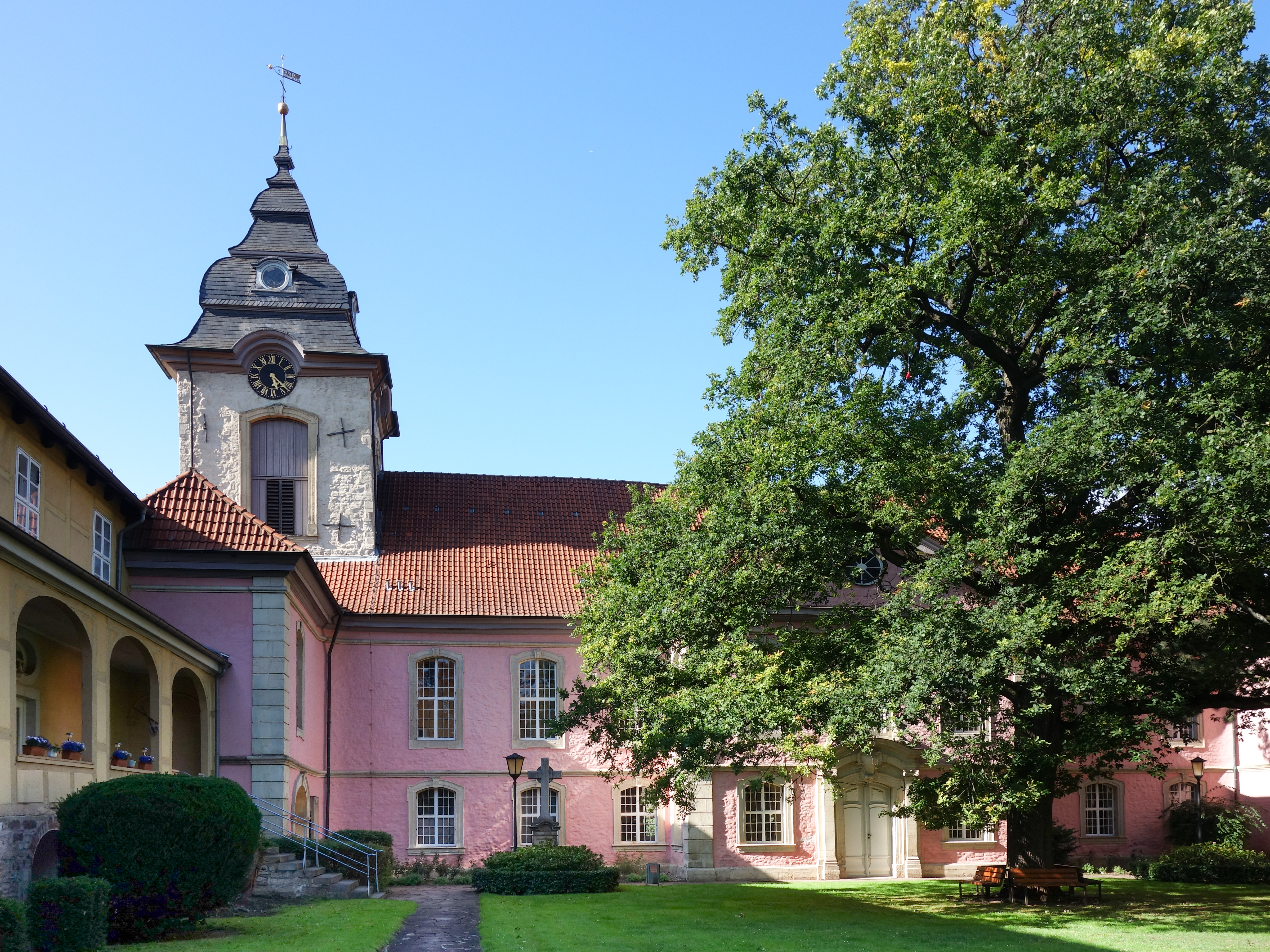 Stiftskirche Steterburg, erbaut 1752 bis 1758, ehemalige Klosterkirche des Damenstiftes Steterburg, heute Pfarrkirche des Ortsteiles Steterburg in Salzgitter, Blick vom Innenhof des Stiftes auf die Südseite der Kirche; rechts im Bild die Eiche auf dem Stiftshofe (Naturdenkmal ND SZ 00013).